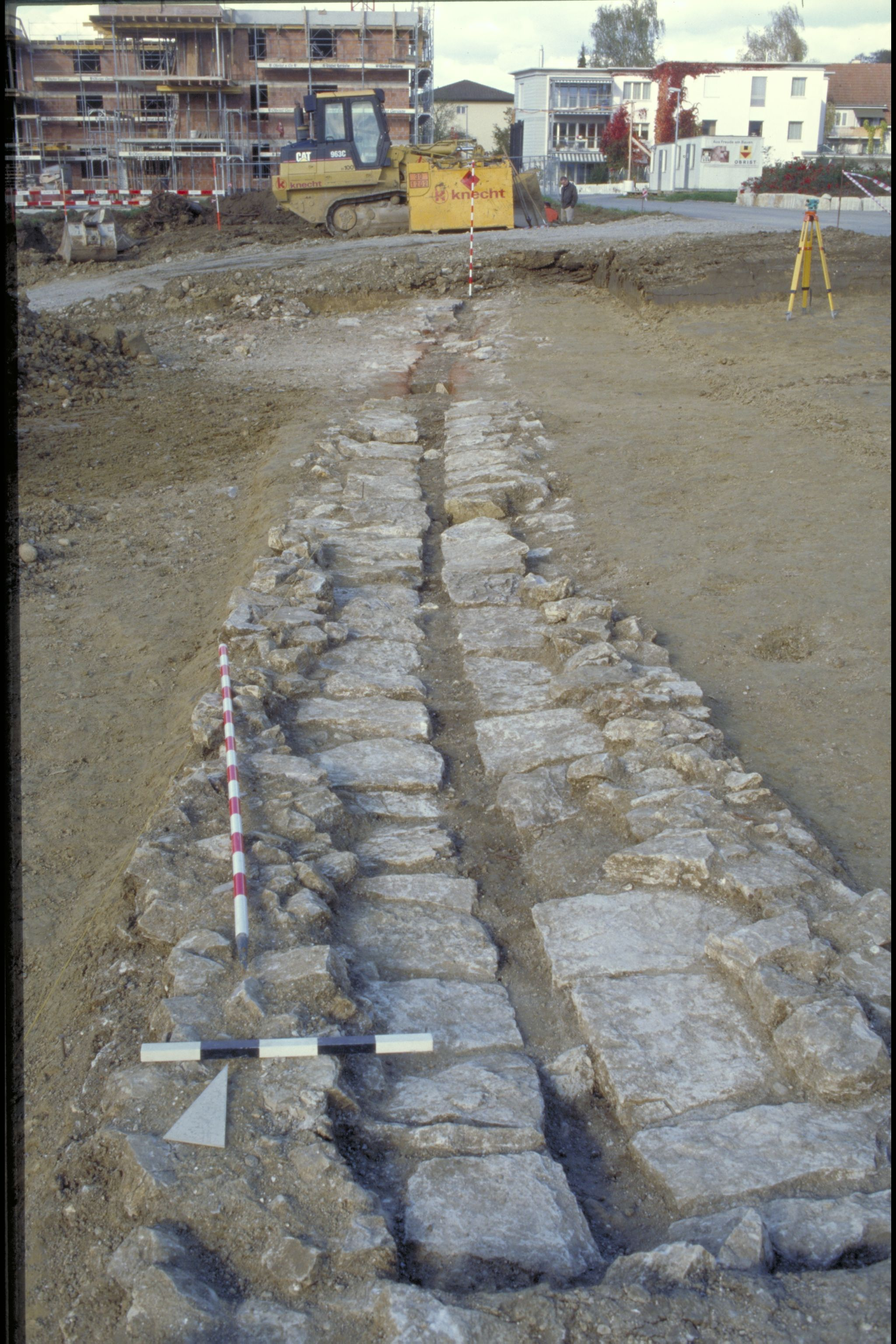 Ausgrabungen der Kantonsarchäologie Aargau Objekt: Tote römische Wasserleitung von Vindonissa Lage: Hausen, Wiesenweg. Die römische Leitung liegt heute unter dem östlichen Vor- und Parkplatz der Behindertenwerkstatt von Hausen am Wiesenweg 2, wo sich eine kleine Informationsstelle befindet. Datierung: 1. Jh. n. Chr. Aufnahmedatum: 2006 Anlass der Grabung: Beim Neubau der Behindertenwerkstatt am Wiesenweg in Hausen ergab sich für die Kantonsarchäologie Aargau die Gelegenheit, ein 56 m langes Teilstück der toten römischen Wasserleitung oberflächlich freizulegen und zu dokumentieren. Das Teilstück konnte nach Abschluss der Dokumentation unversehrt im Boden belassen und wieder mit Kies überdeckt warden. Beschreibung: Die Deckplatte über dem Kanal fehlt; obere und untere Steinlage des "falschen" Gewölbes sind sichtbar; diese reduzieren die lichte Breite des Kanals gegen oben auf 15-20 cm. Der Verlauf beschreibt hier eine leichte Kurve, vermutlich dem römischen Geländeverlauf folgend. Literatur: Jahresbericht Gesellschaft Pro Vindonissa, 2006, S. 98-99.